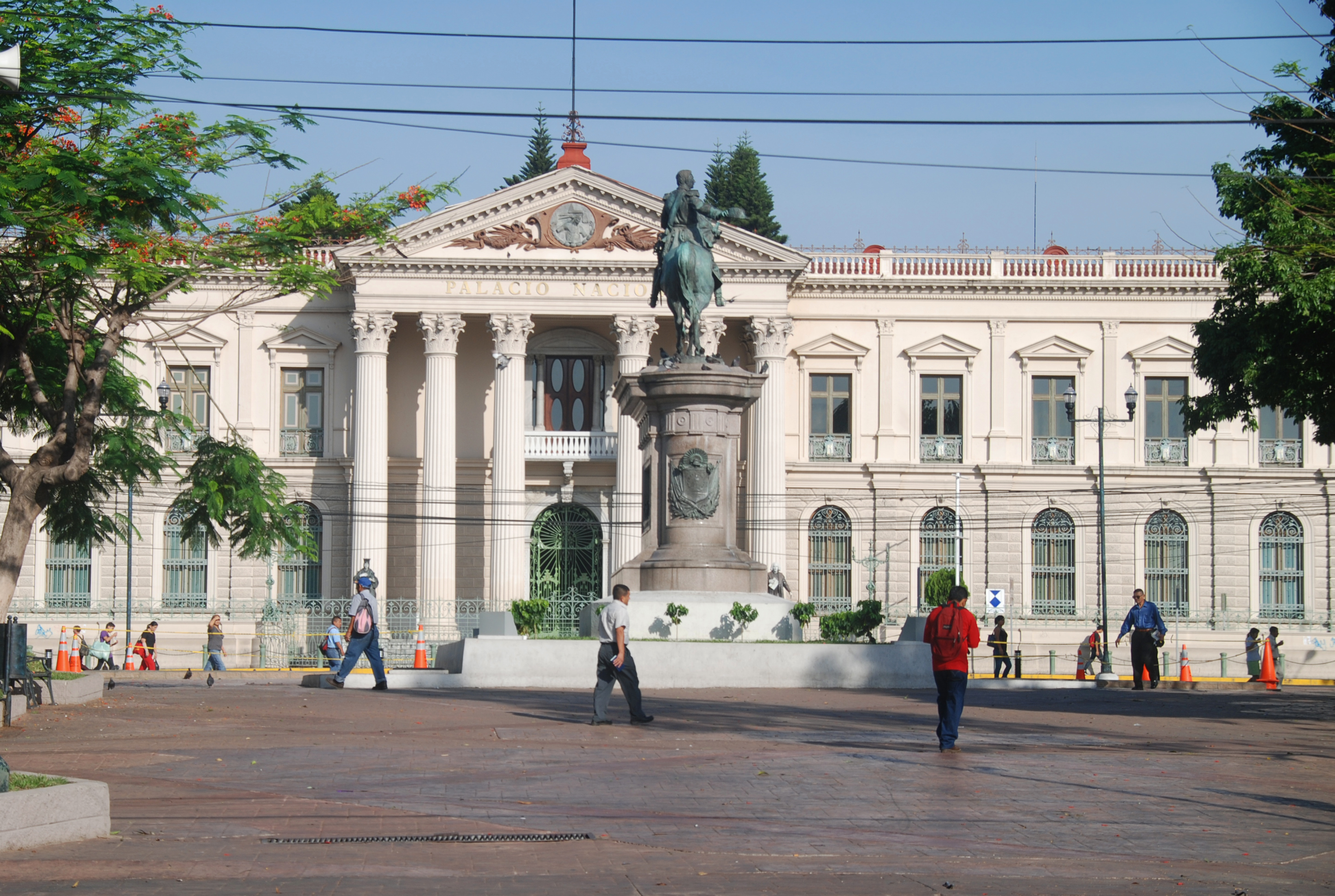 Digi Cam